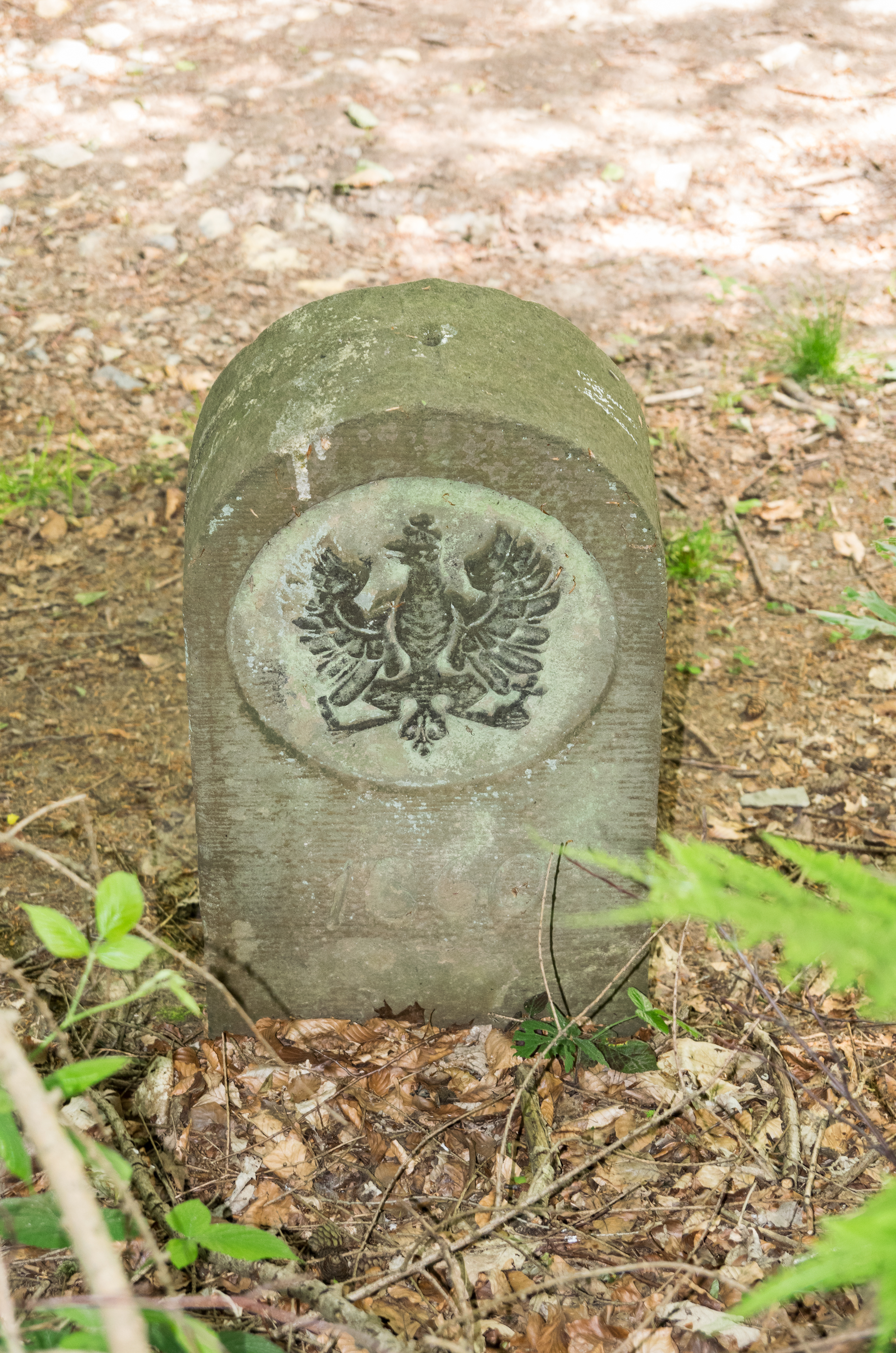 Historischer Grenzstein von 1860 zwischen dem Fürstentum Lippe und dem Königreich Preußen; heute an der Grenze zwischen Bad Salzuflen und Herford am Fuß des Stuckenbergs